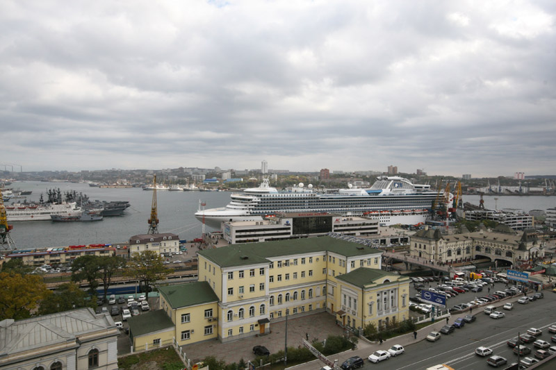 Здание ДВЖД, ж/д вокзал, морской вокзал